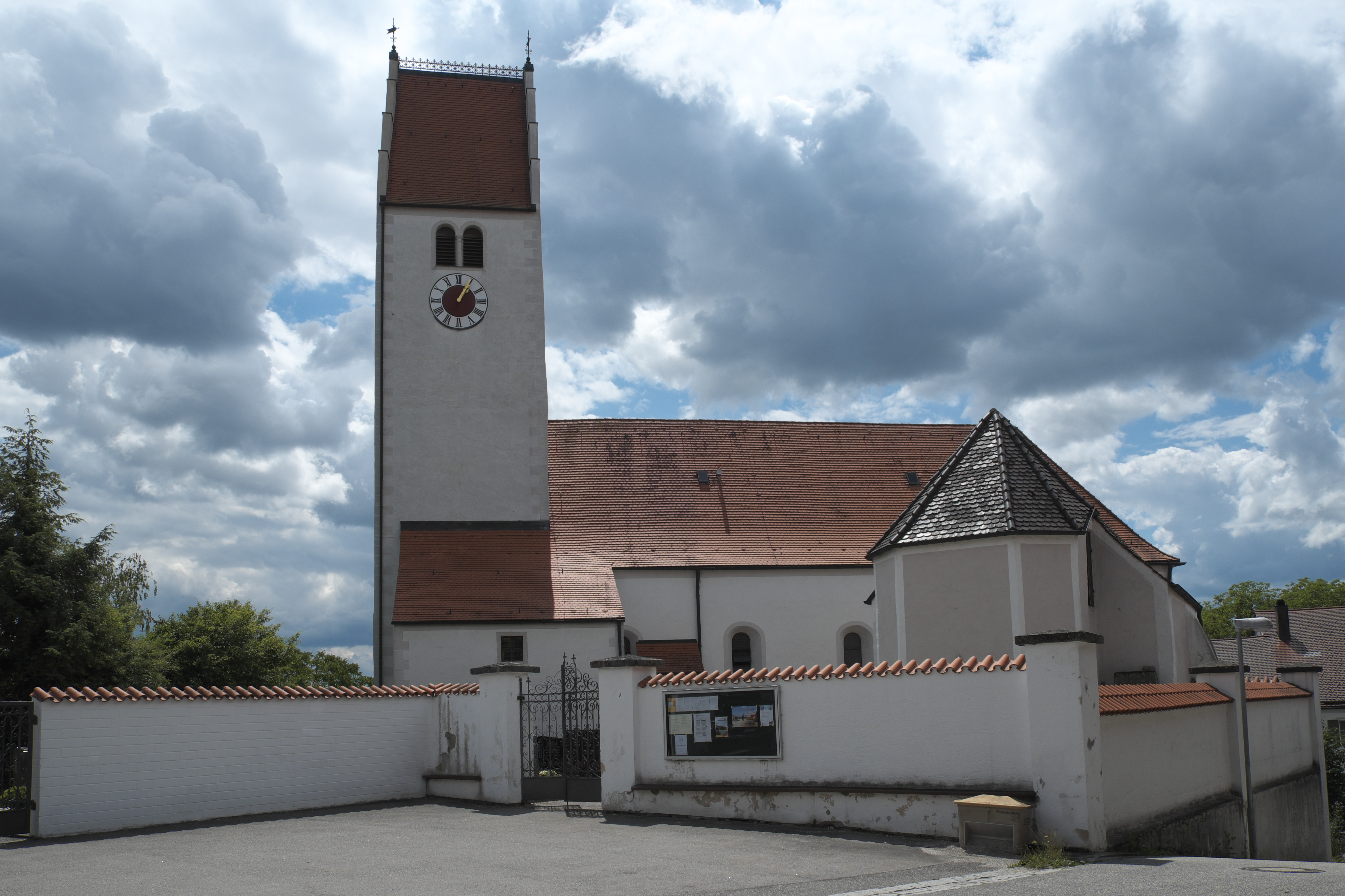 Katholische Kirche St. Georg in Hienheim (Neustadt an der Donau) im niederbayerischen Landkreis Kelheim (Bayern/Deutschland)